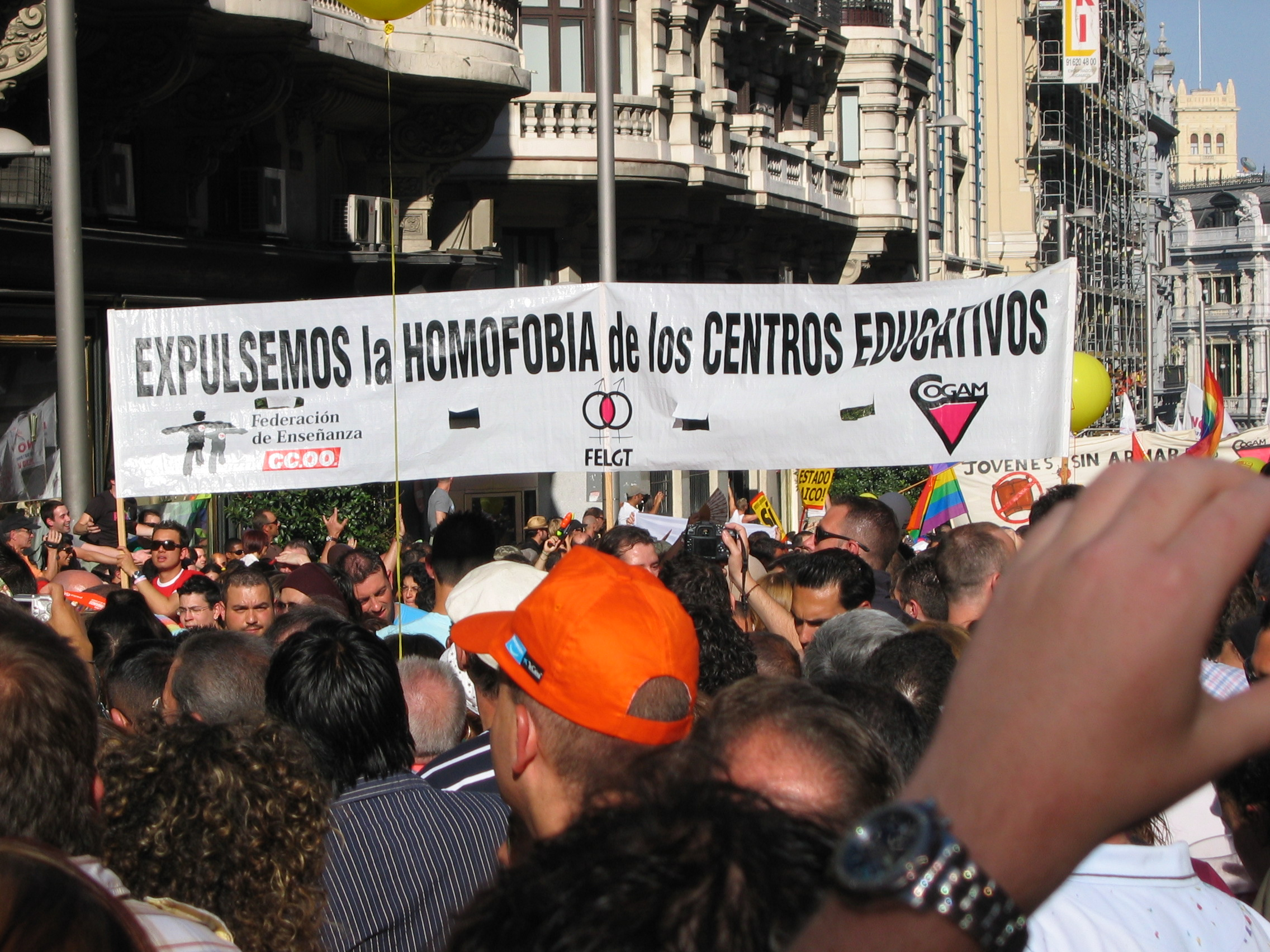 Orgulo Madrid 2007 - Pancarta: "Fuera la homofobia de los centros educativos"